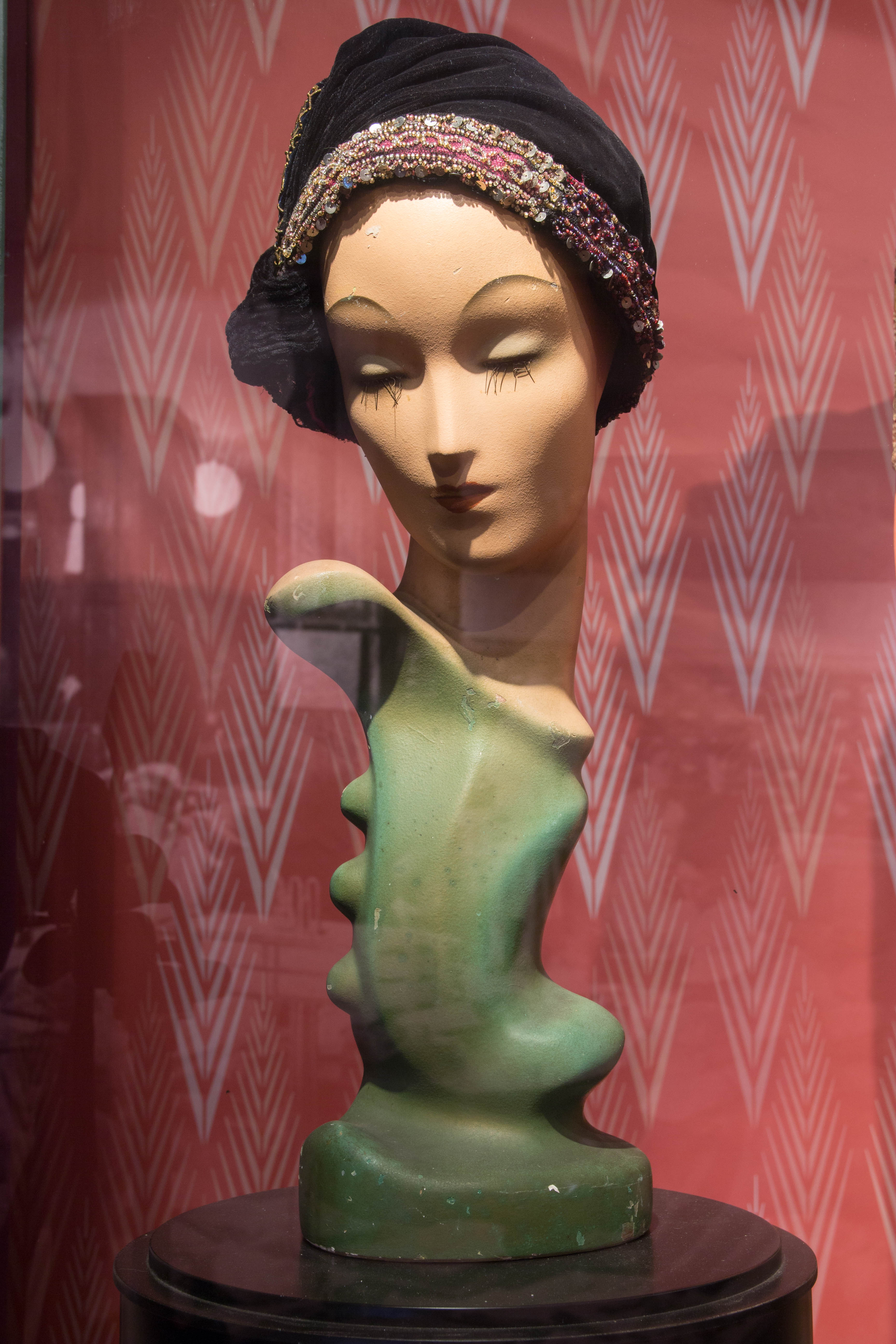 Kopffigur aus Gips, für Schaufenster, mit schwarzem Topfhut, ca. 1920, in der Ausstellung "Macht der Mode", Textilfabrik Cromford